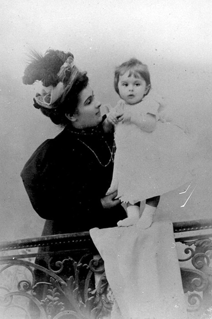 Аврора Павловна и Павел Карагеоргиевич (фото 1896 г.)